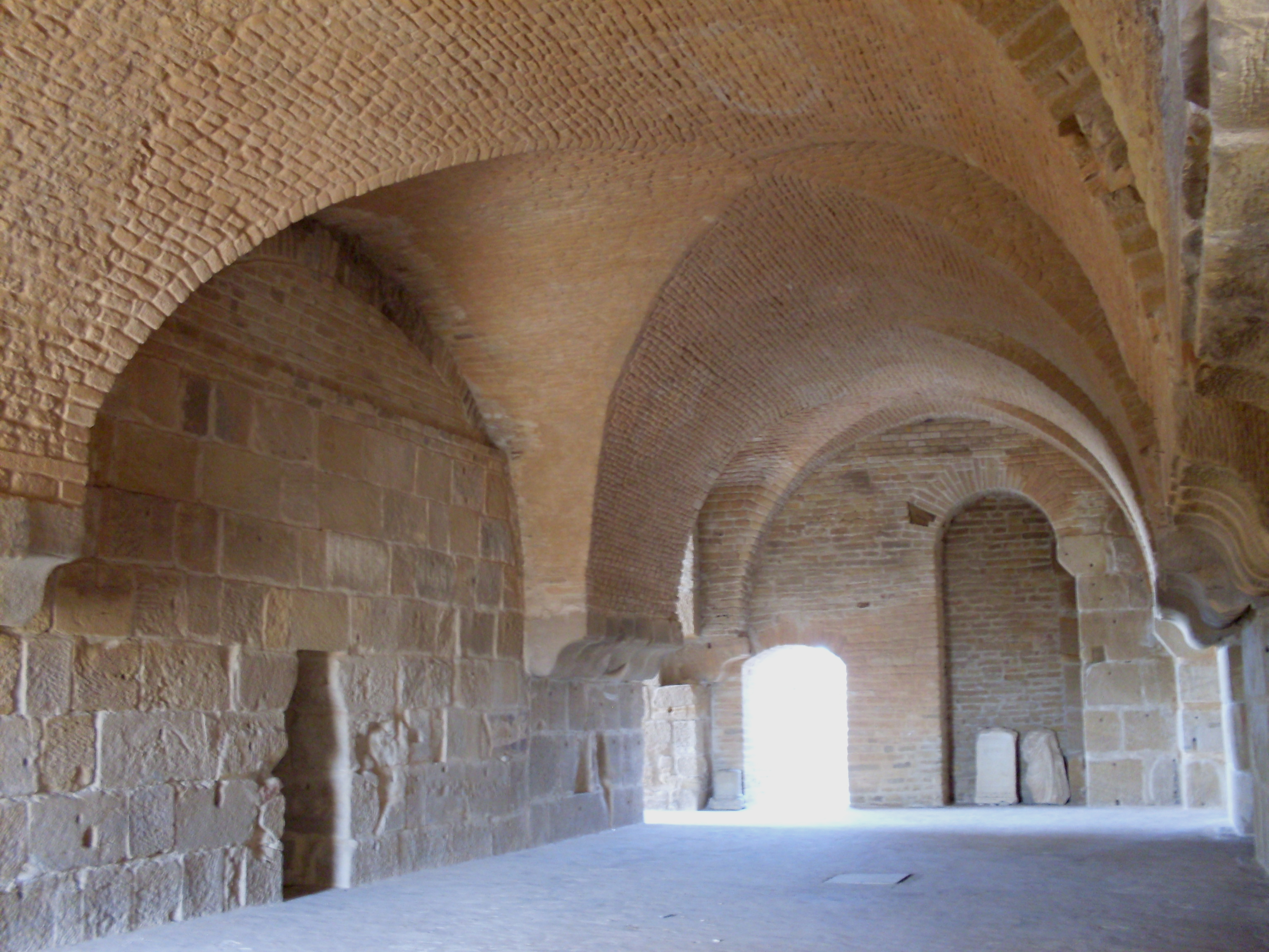 Odhna Dessous du Capitole